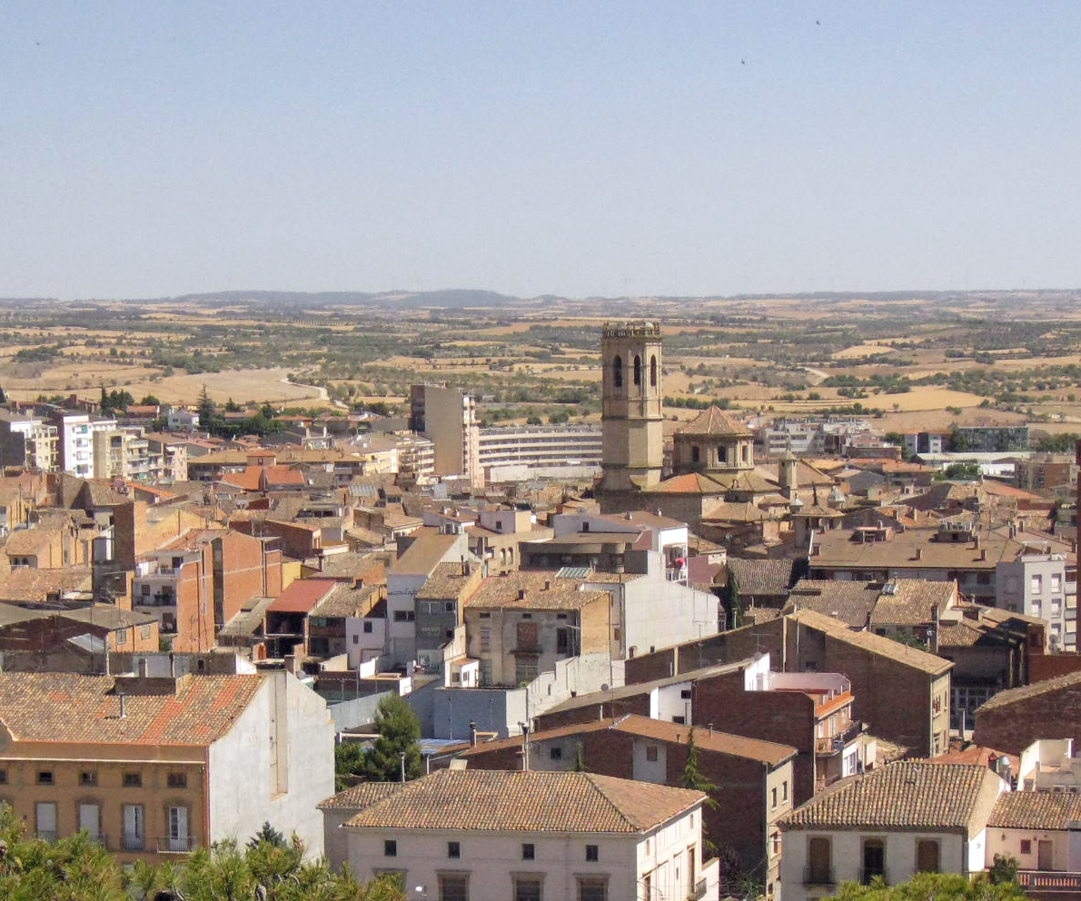 Església parroquial de Santa Maria de l'Alba (Tàrrega)